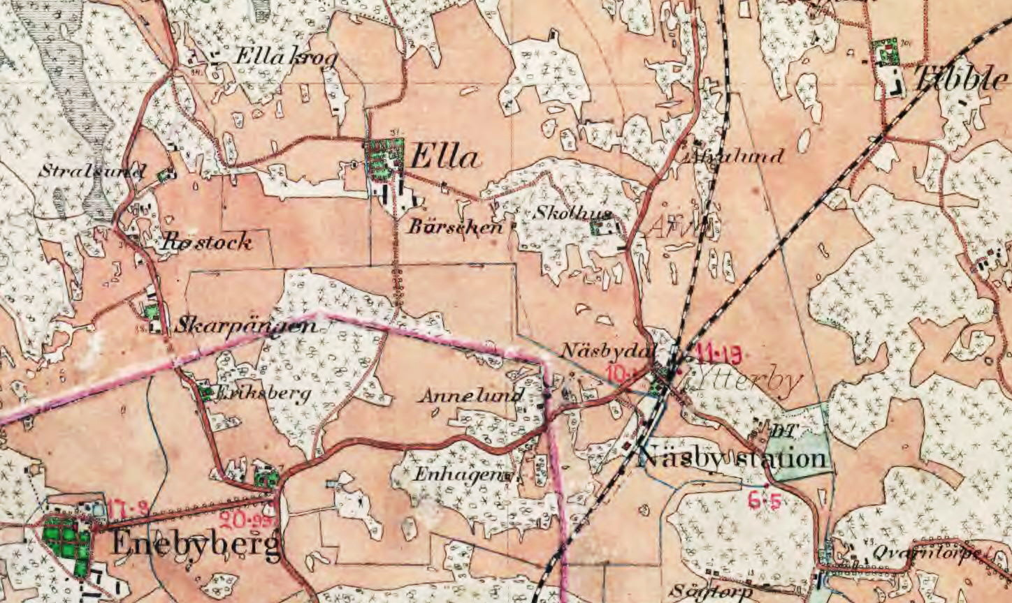 Enebyberg och Ella gård på Häradsekonomiska kartan